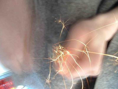 Etincelles produites par un briquet en acier frappé contre un silex. (c) 2004 Stéphane Bois